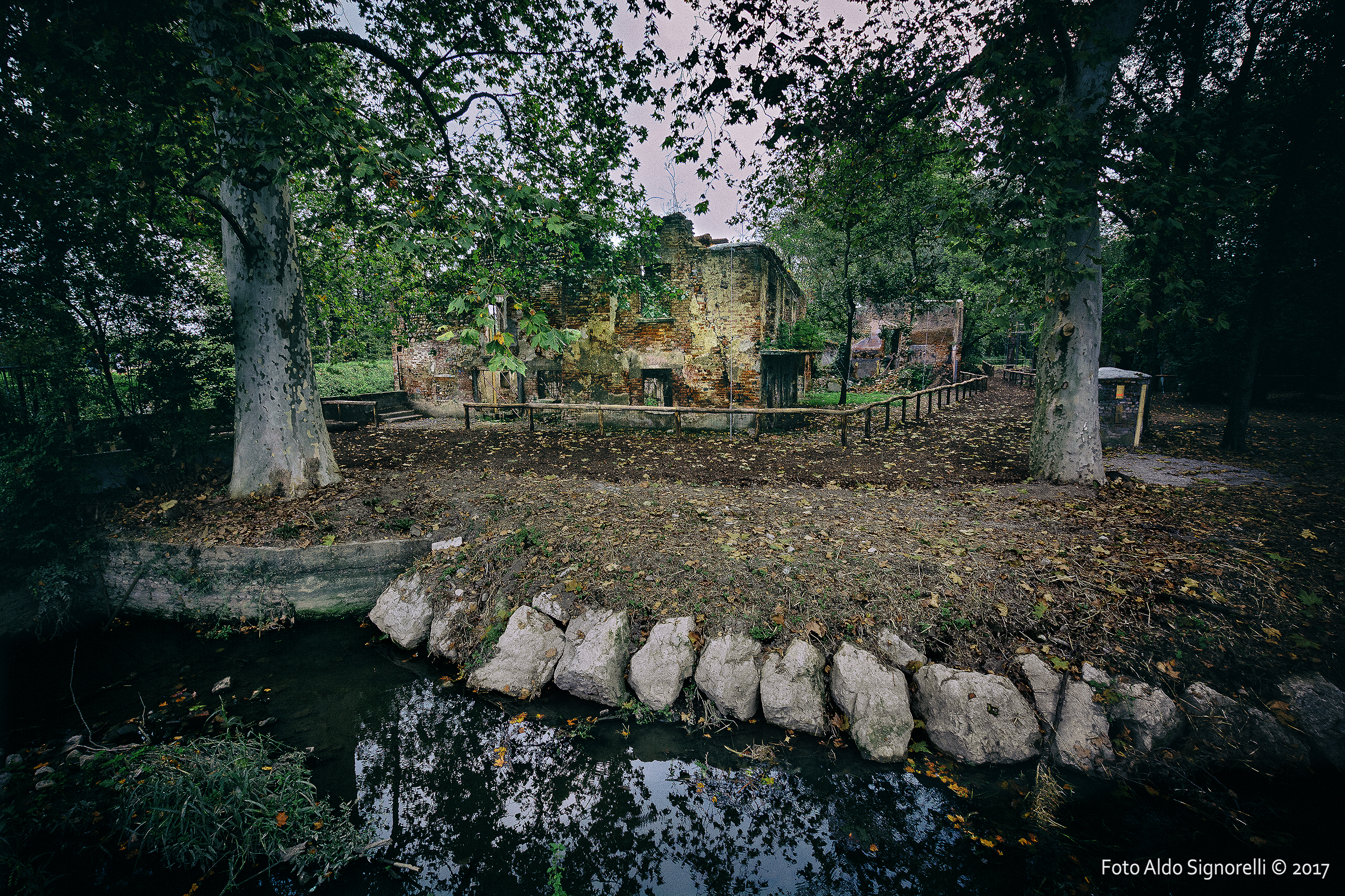 Q29886088 This is a photo of a monument which is part of cultural heritage of Italy.